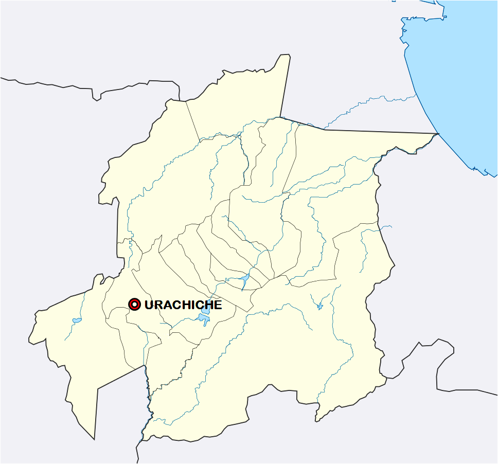 Mapa de Yaracuy